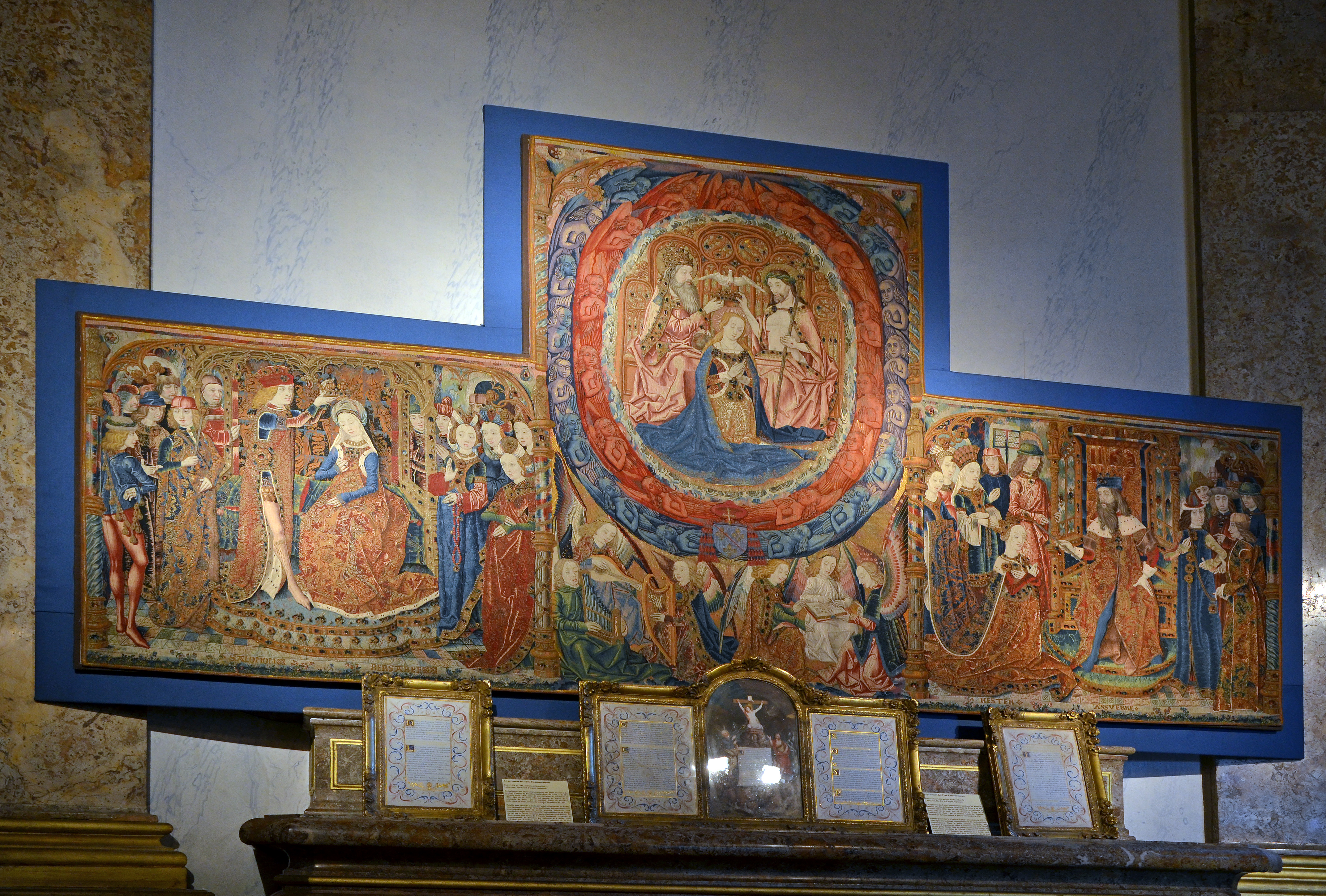 Tapisserie des 3 couronnements musée de Sens, Yonne, Bourgogne,France. La tapisserie a été commandée par le cardinal Charles de Bourbon, archevêque de Lyon de 1476 à 1488, représente au centre le Couronnement de la Vierge, surmontant un concert céleste. De part et d'autre, deux couronnements de personnages de l'Ancien Testament : Esther et Bethsabée.